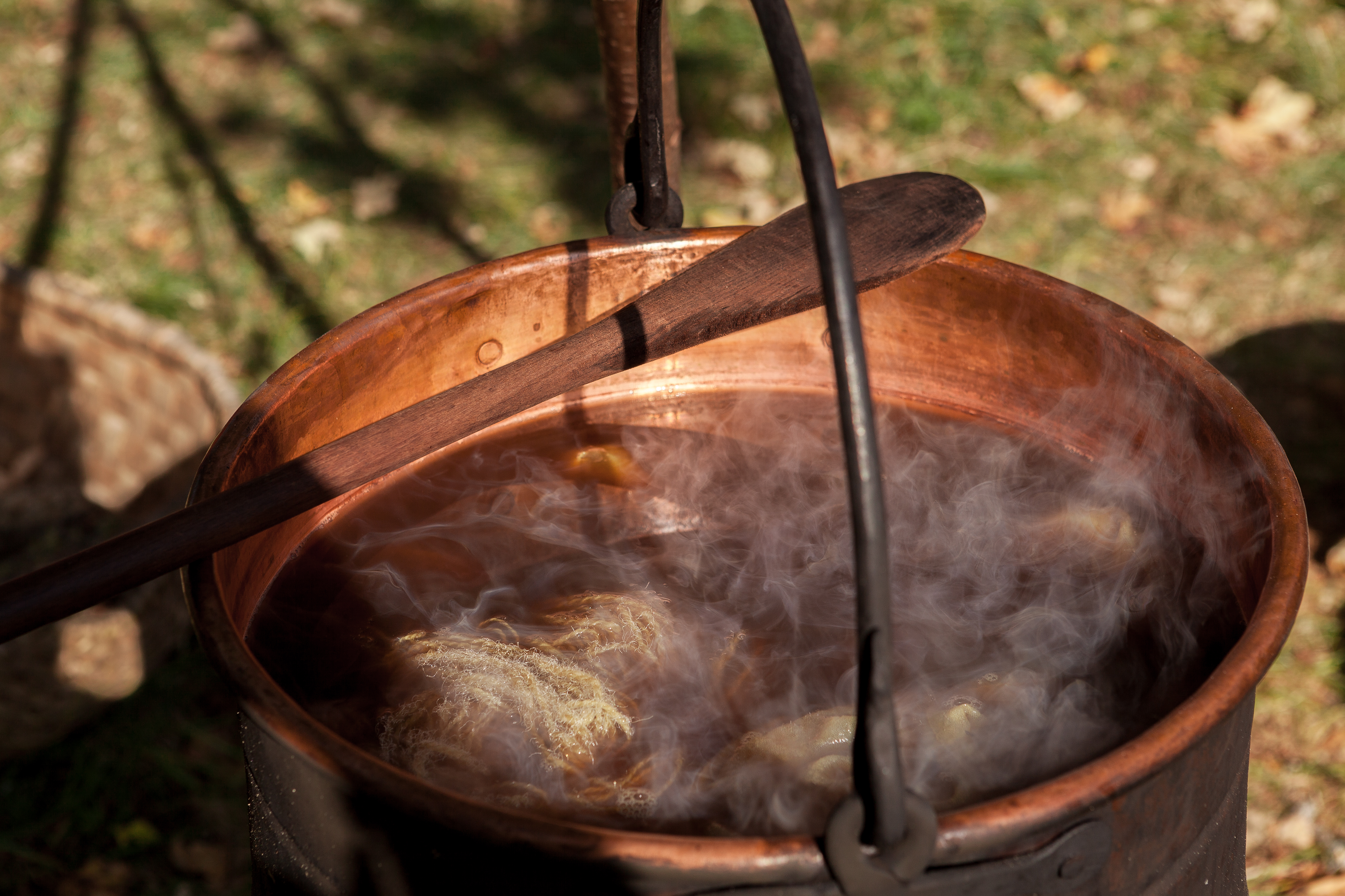 Kupferkessel mit gelb-grünlichen Färbersud und Wolle. Der aufliegende Löffel wird zum regelmäßigen Umrühren des Sudes genutzt.